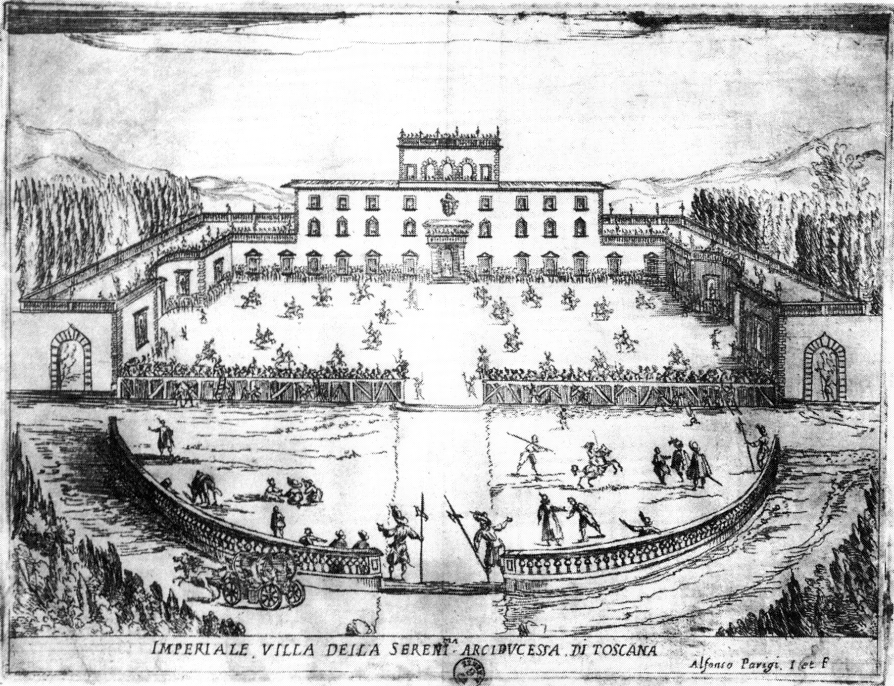 Alfonso Parigi: "Imperiale Villa della Serenissima Arciducessa di Toscana" with a horse ballet in the courtyard, which is believed to be from Francesca Caccini's "La liberazione di Ruggiero" (1625)